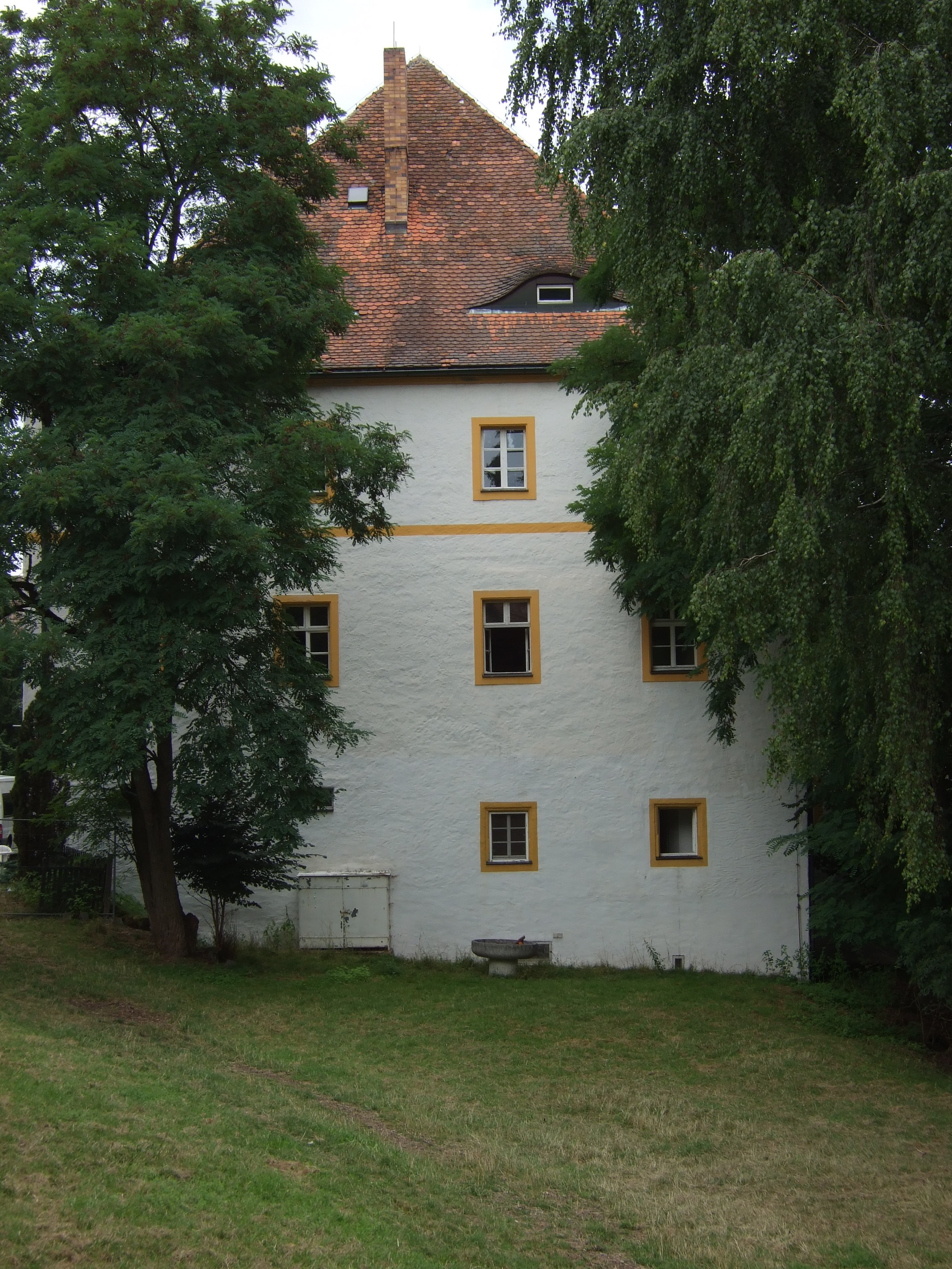 Oberes Schloss in Weidenberg, Denkmal Nr. D-4-72-199-5